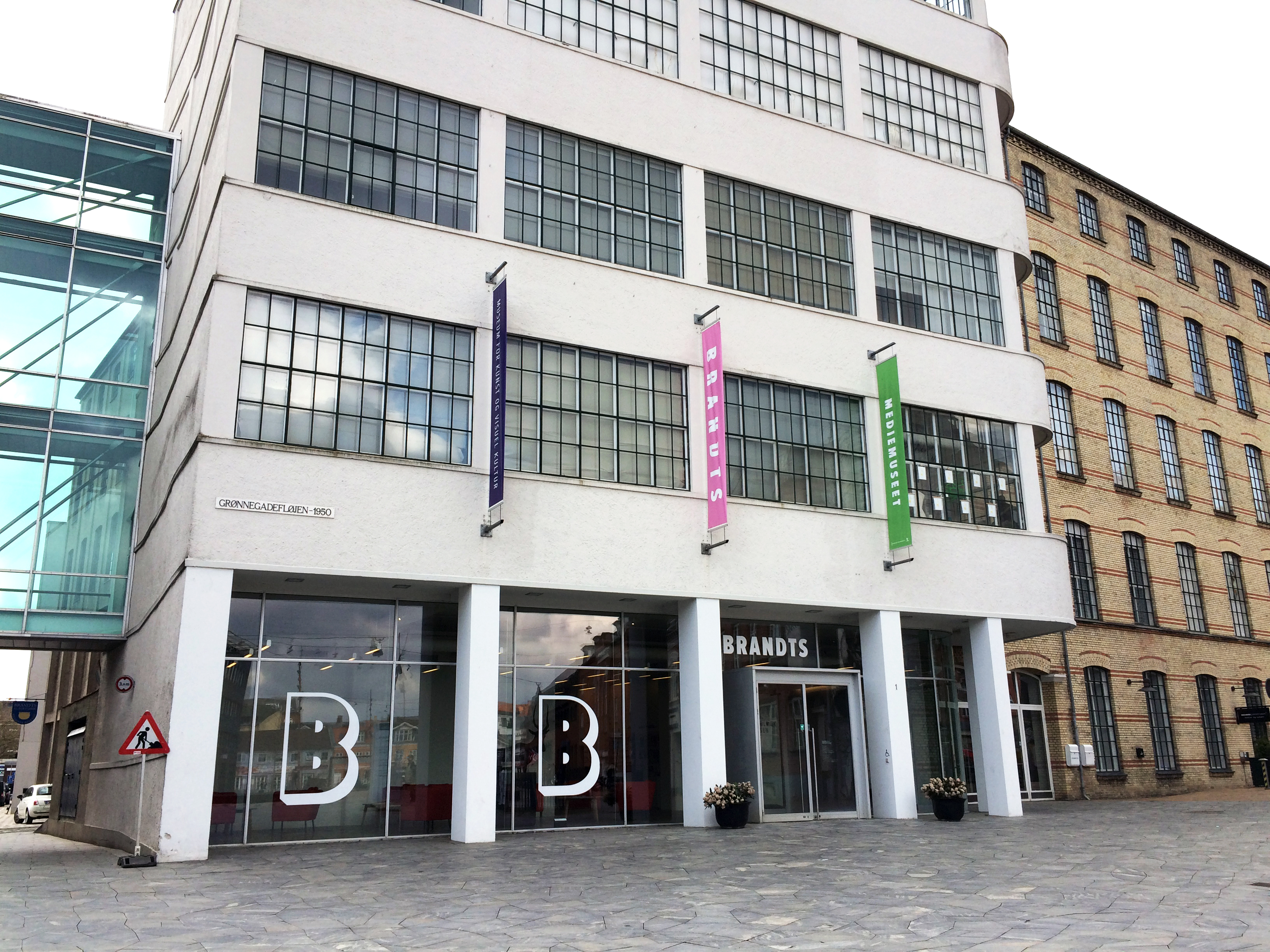 Her ses Brandts' facade og hovedindgang ud til Grønnegade. Odense, Maj 2015.